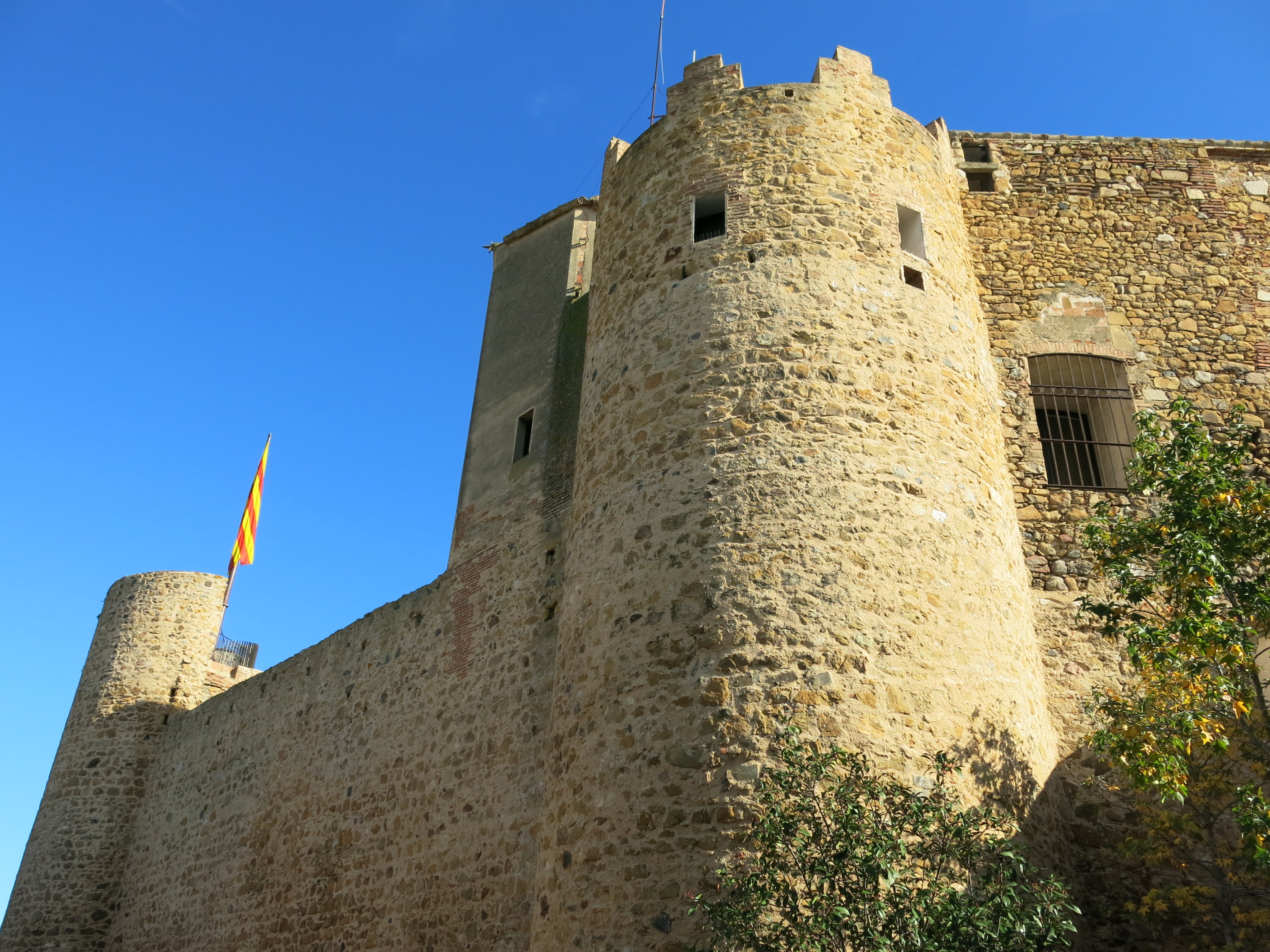 Castell de Llagostera, comarca de la Selva - Catalunya